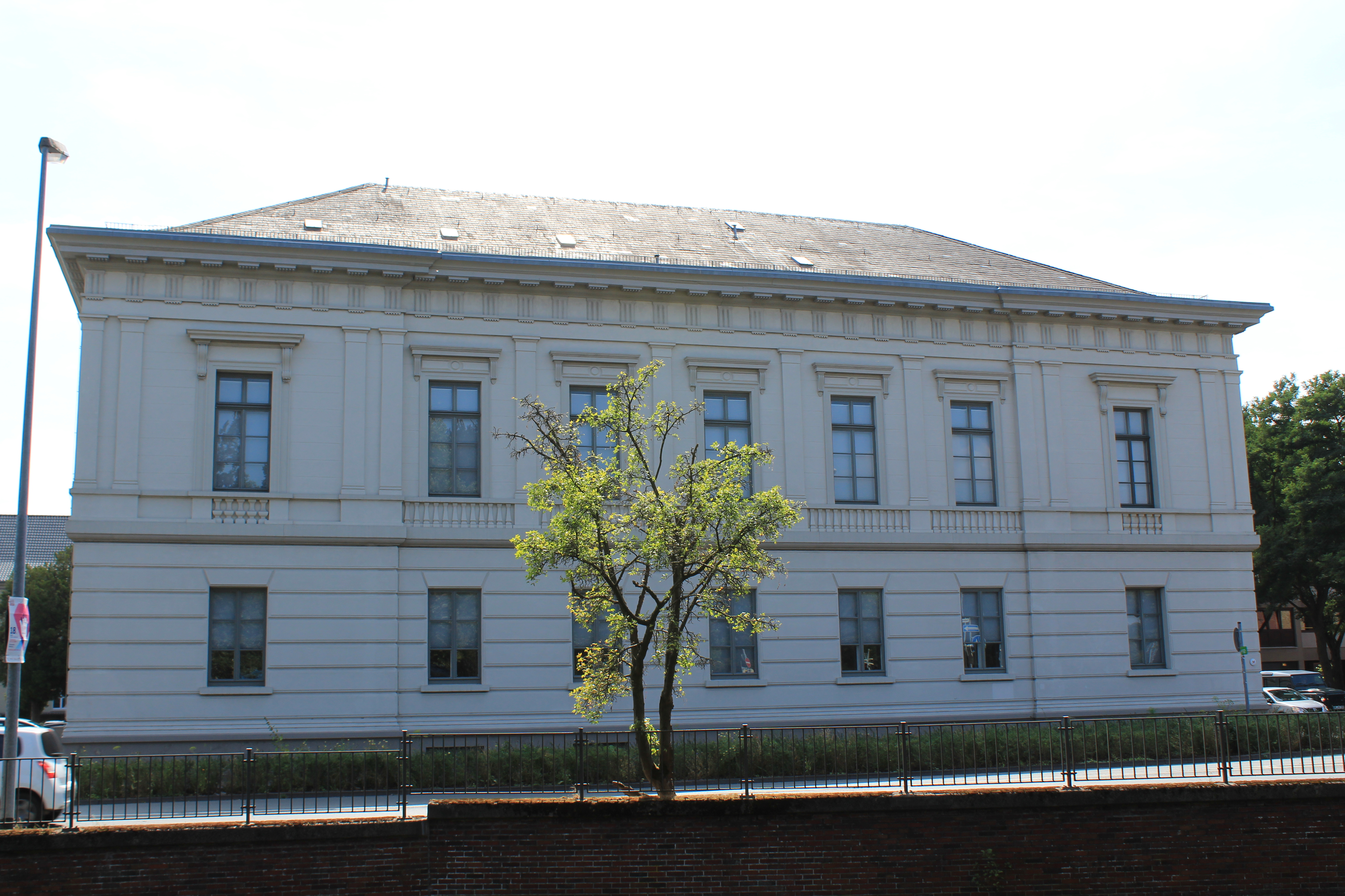 Das 1826 errichtete Prinzenpalais in Oldenburg